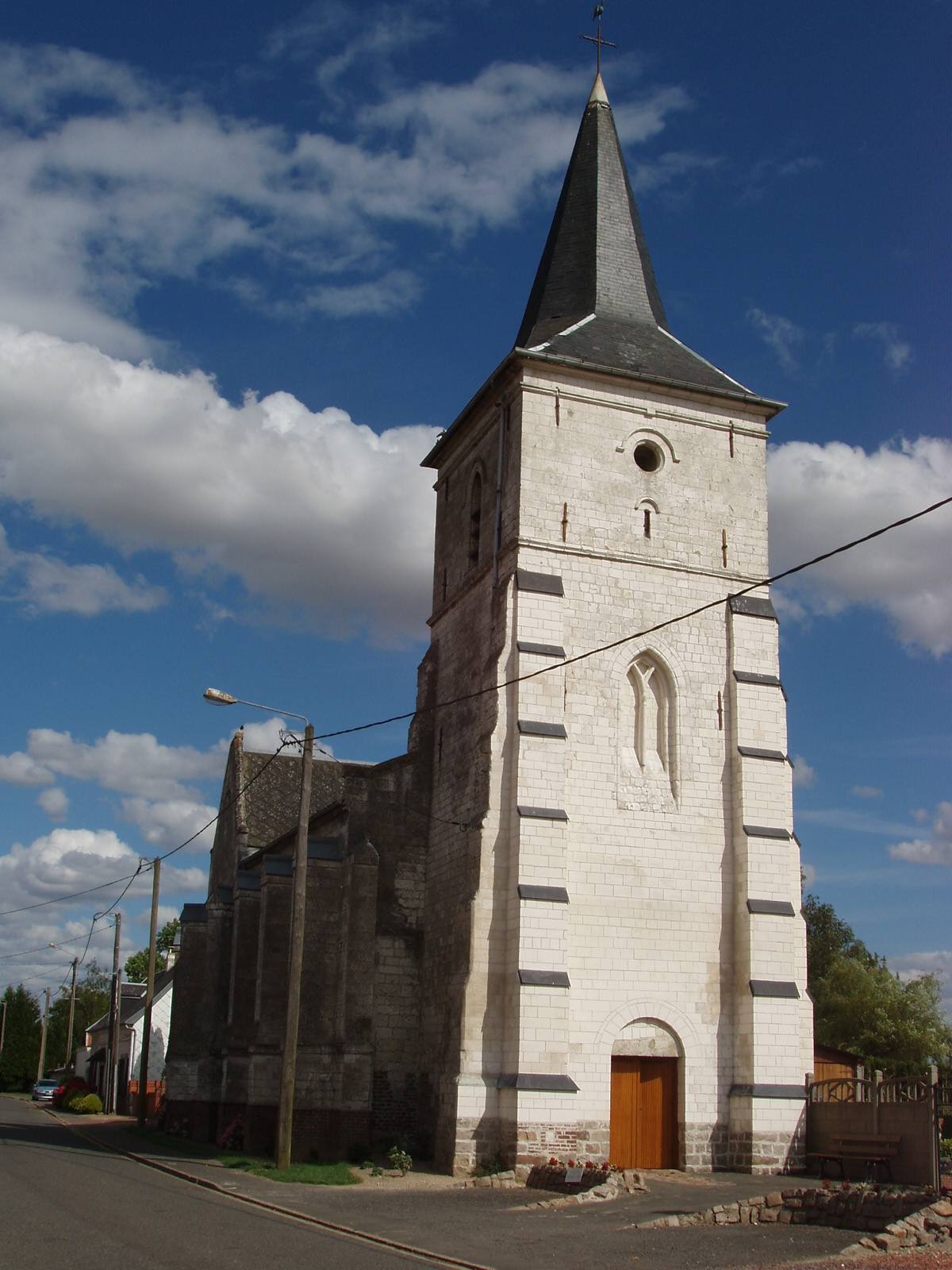 Commune française de Tilloy-lès-Hermaville dans le département du Pas-de-Calais en France - Eglise